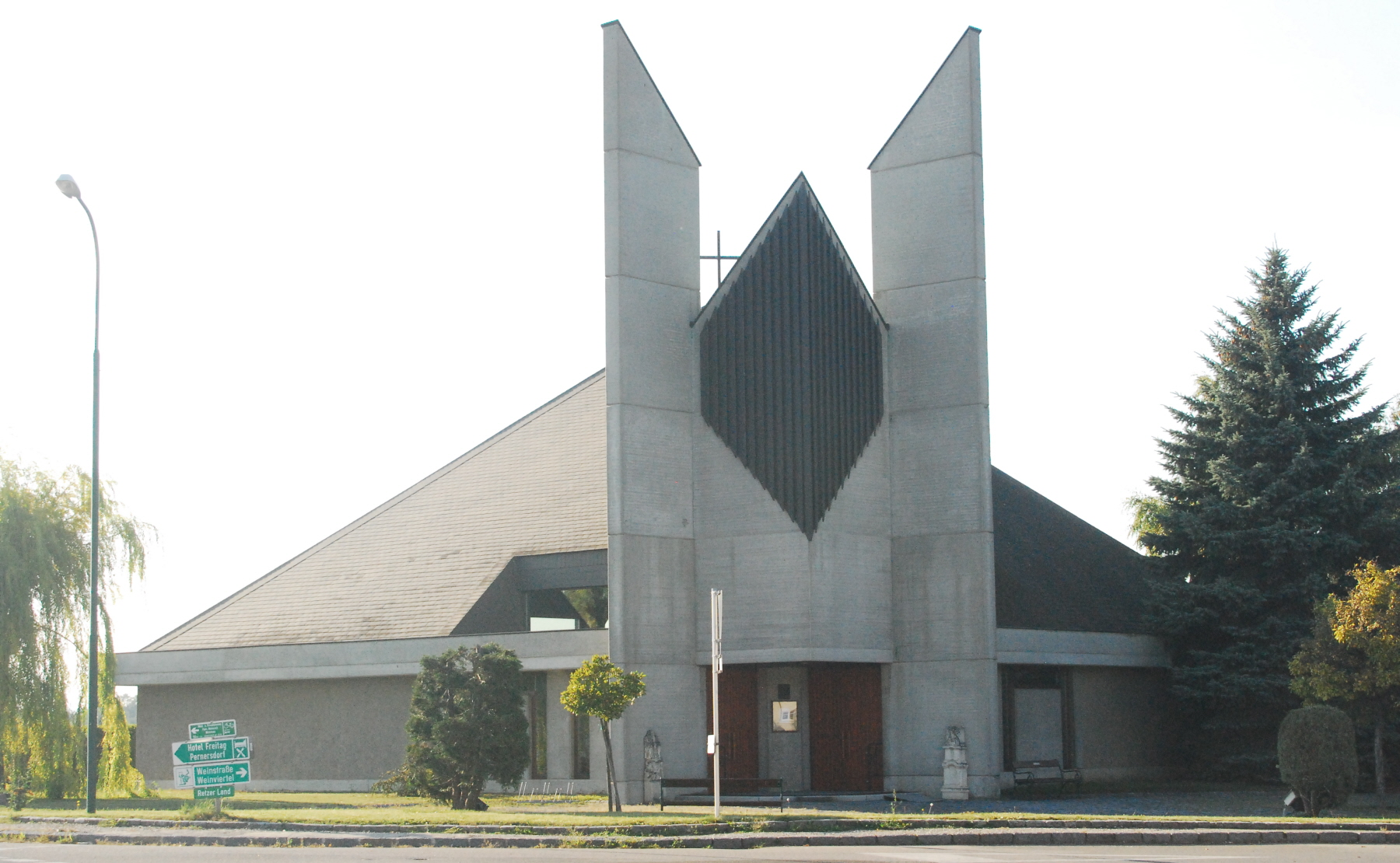 Neue Pfarrkirche von Jetzelsdorf in Niederösterreich